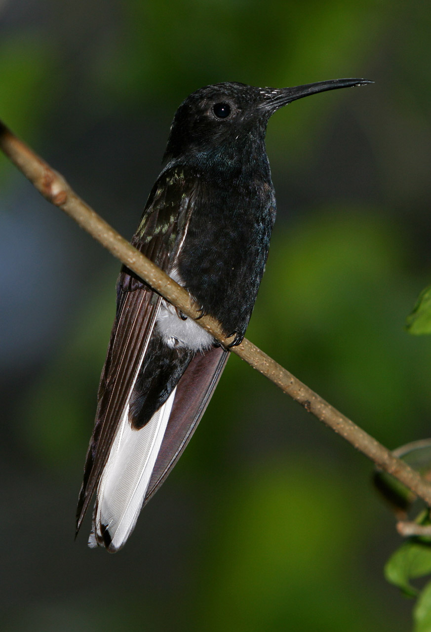 Black Jacobin (Florisuga fusca) Foz do Iguaçu, Brazil